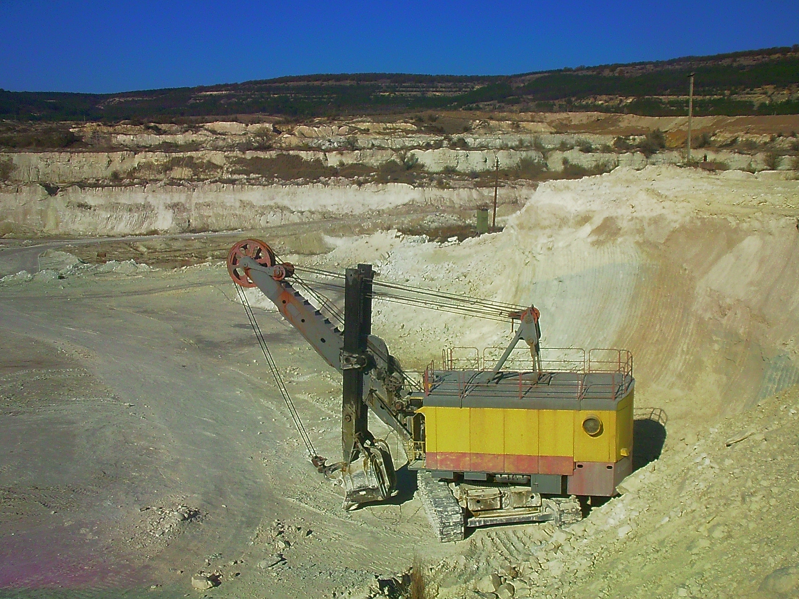 карьерный гусеничный экскаватор ЭКГ-5А